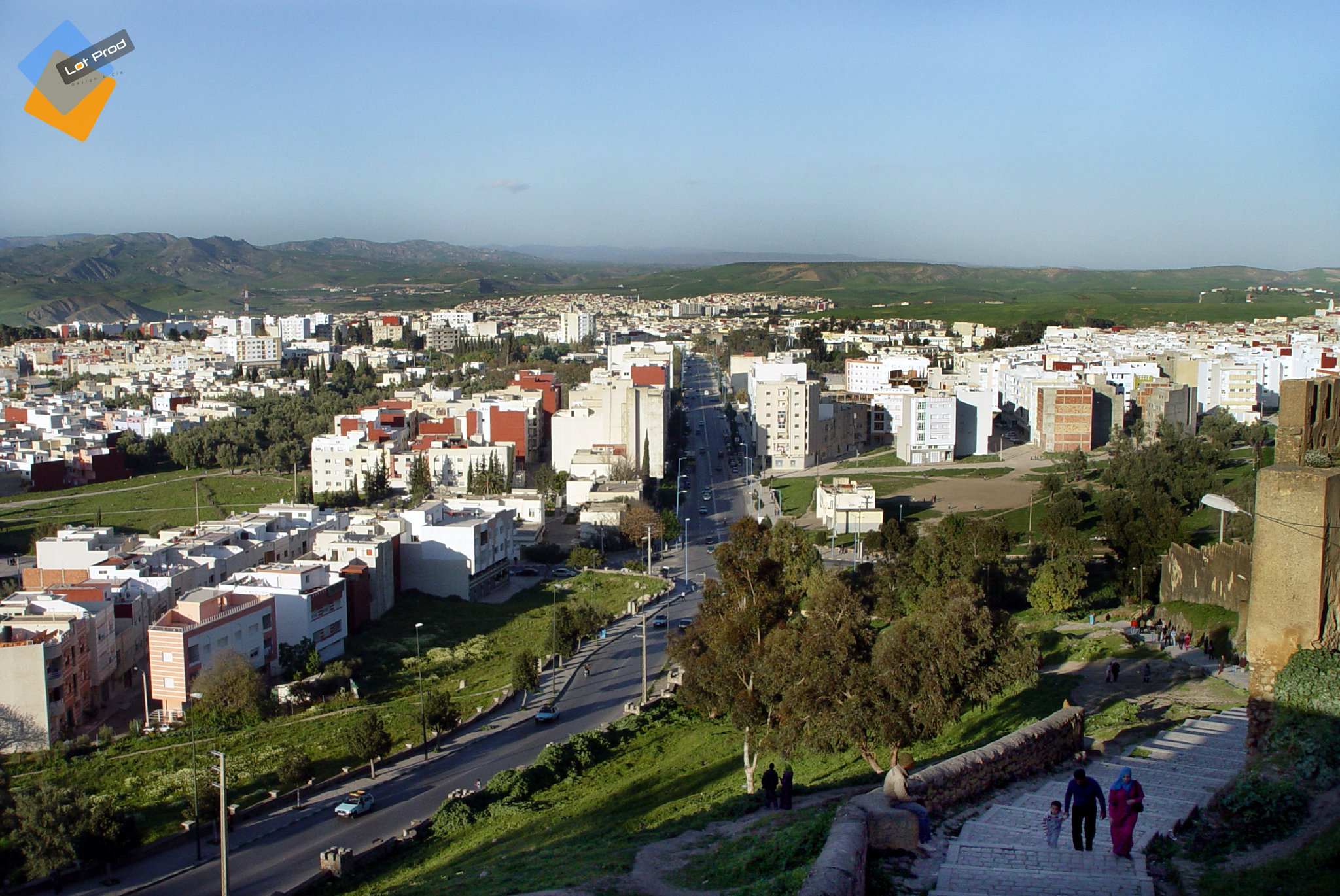 La ville nouvelle